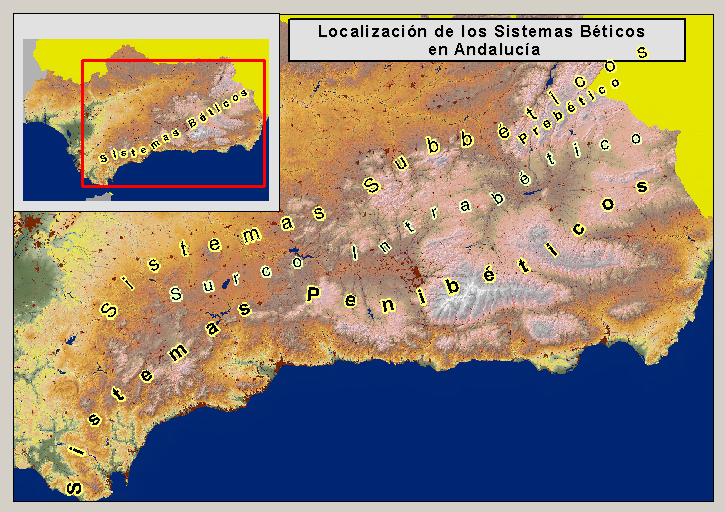 Localización de los Sistemas Béticos en Andalucía